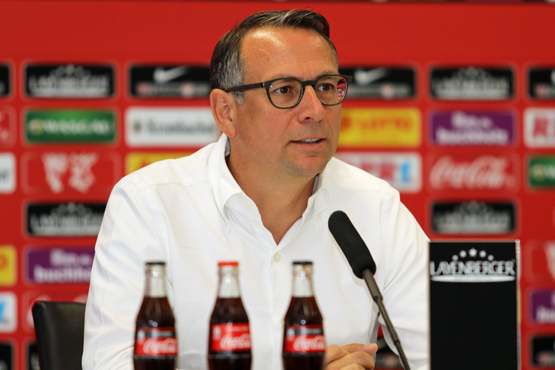 Martin Bader (Geschäftsführer Sport des 1. FC Kaiserslautern)